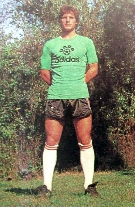 Jean-Luc Ettori (1977), 'Football 1978', Panini figurina n°214.